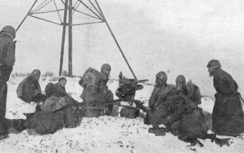 Postazione anticarro italiana durante la campagna di Russia